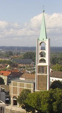 Gelsenkirchen, Ev. Altstadtkirche vom Hamburg-Mannheimer-Gebäude aus fotografiert